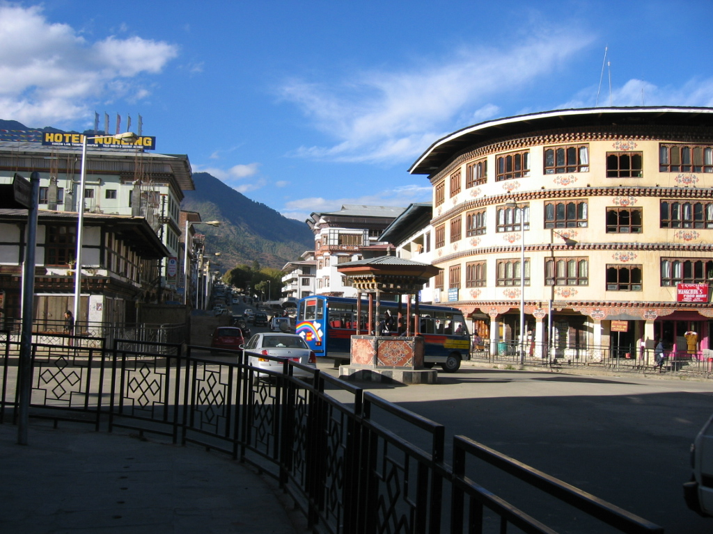 廷布（向柏霖拍的照片）